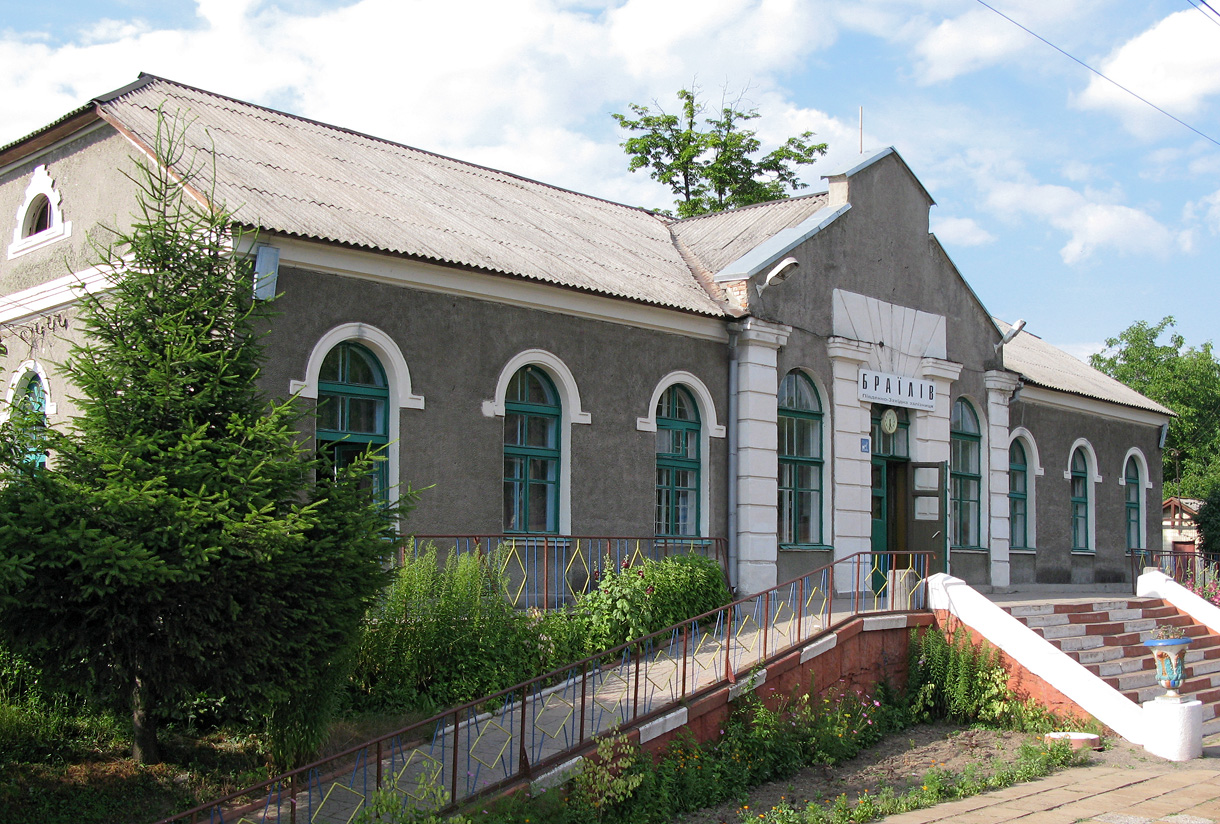 Браїлів